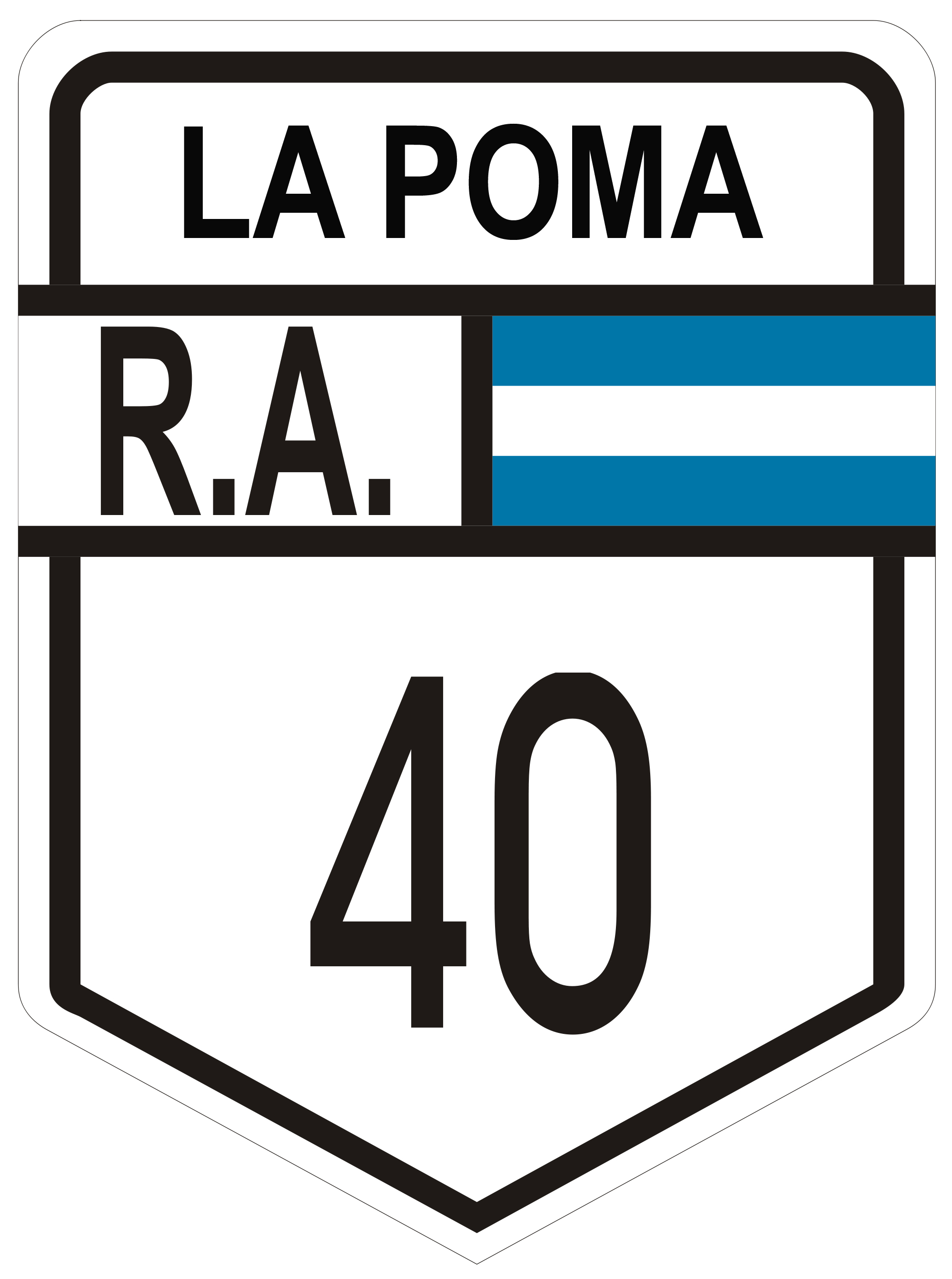 La Poma - RN40